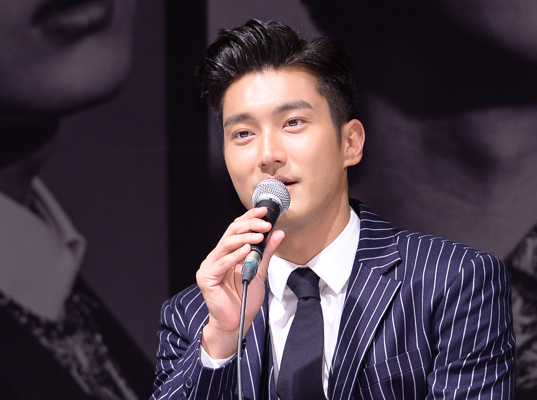 슈퍼주니어 멤버들이 15일 오후 서울 강남구 삼성동 코엑스 아티움에서 열린 스페셜 앨범 'Devil' 발매 기념 기자회견에서 인사를 하고 있다. 2015.07.15 / 이석우 기자